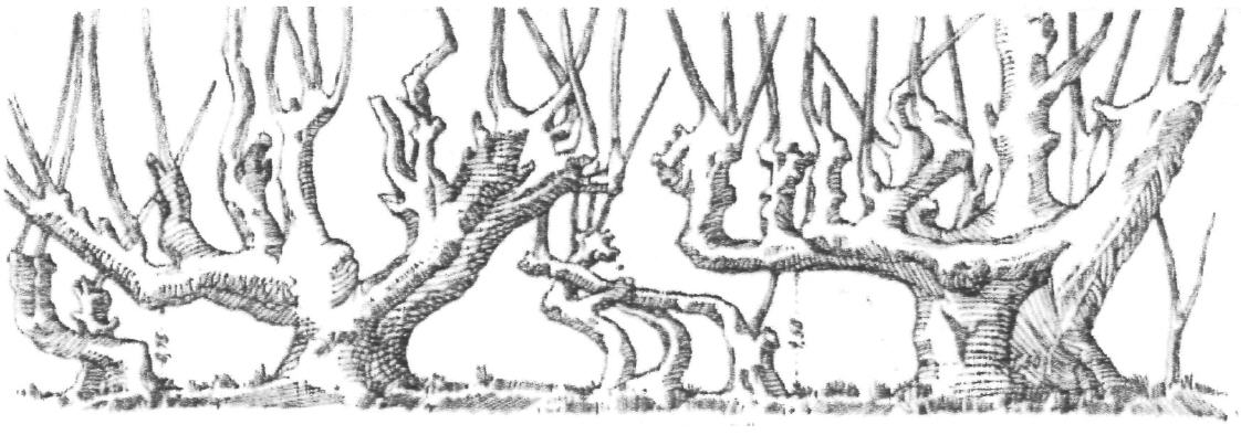 Schematische Skizze eines Gebücks